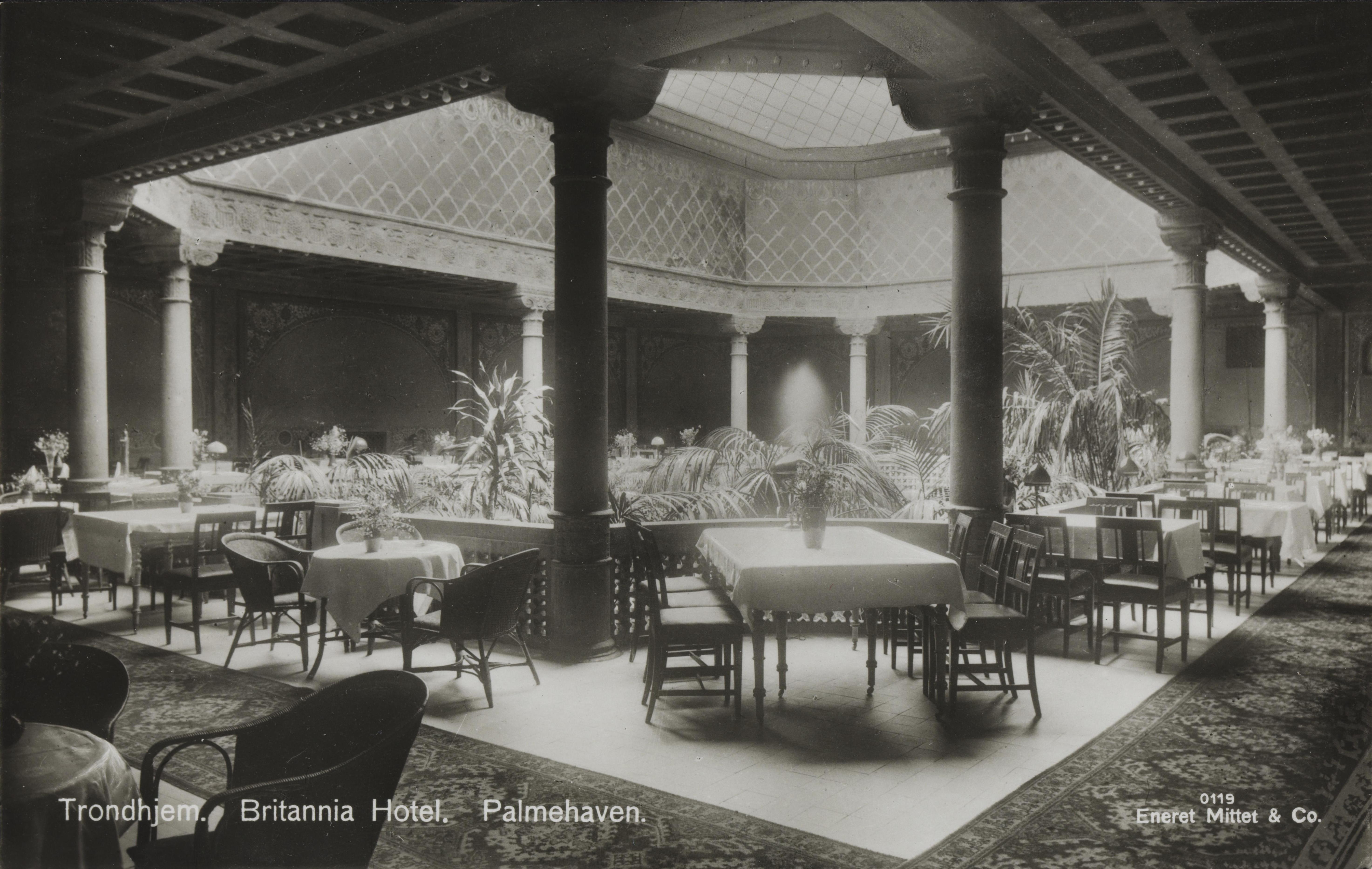 Bildet er hentet fra Nasjonalbibliotekets bildesamling Britannia hotell,Dronningens gate, Trondheim, Sør Trøndelag